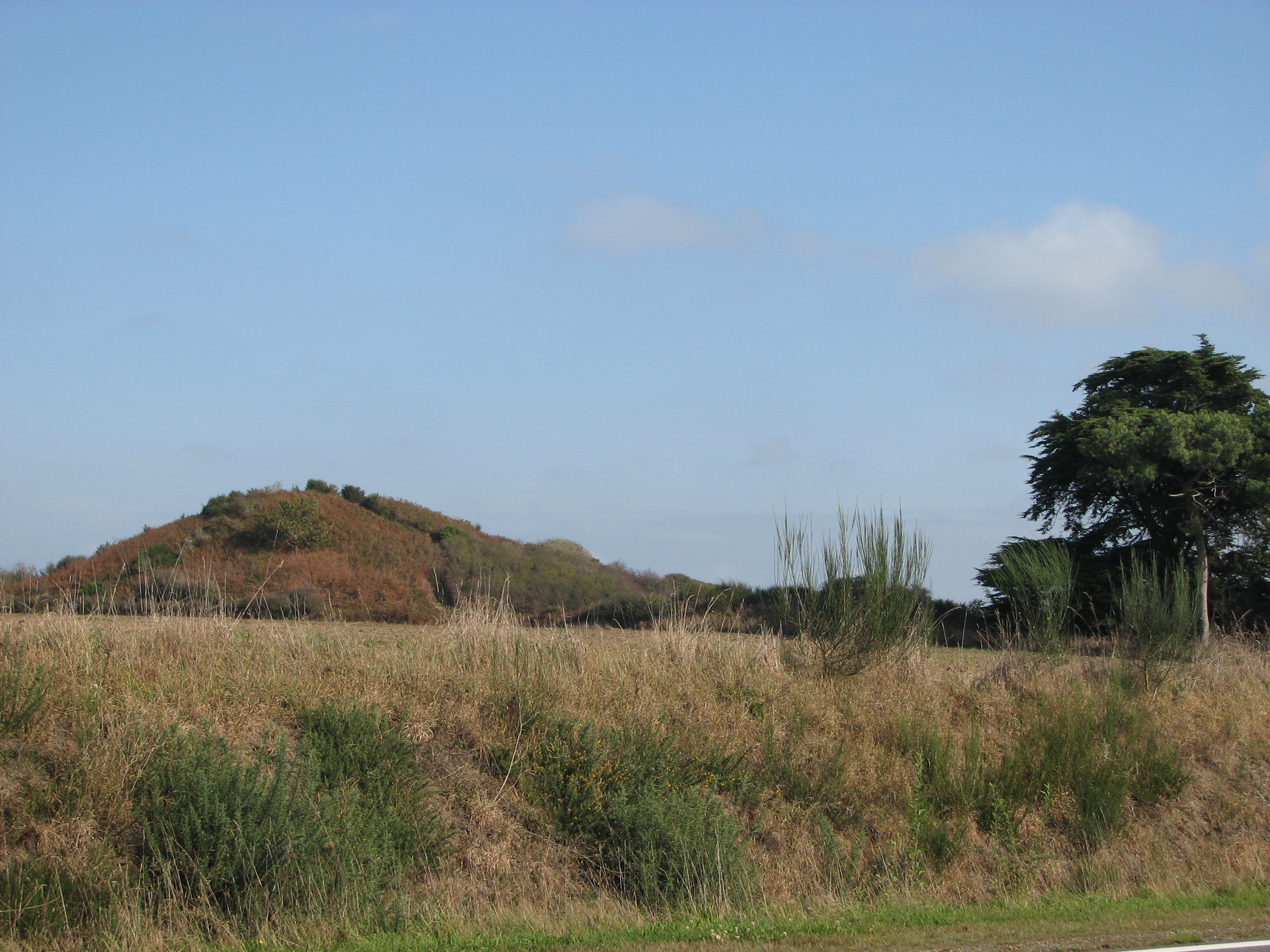 Le tumulus de Tumiac, dit «butte de César», dans la commune d'Arzon (Morbihan)